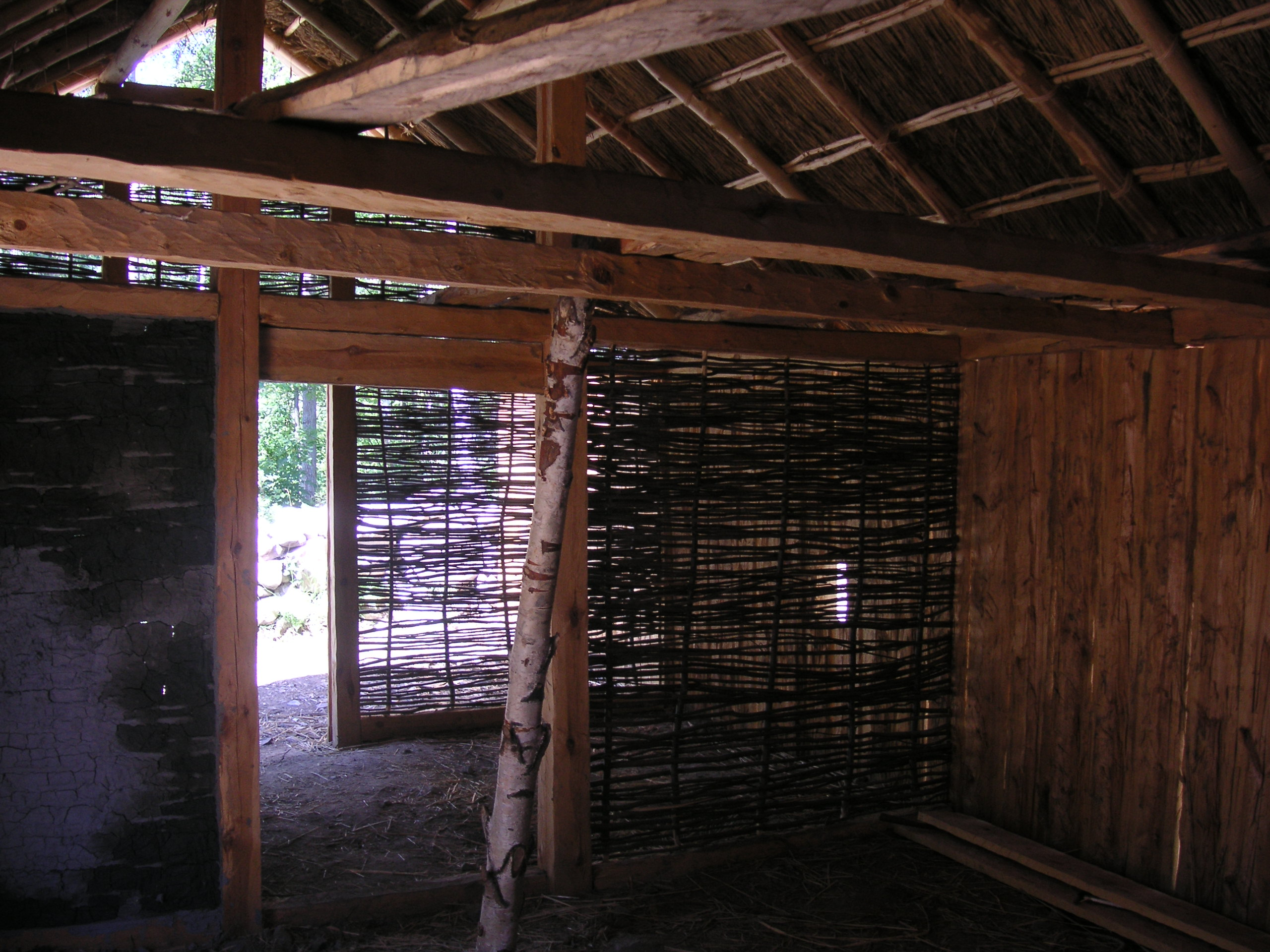 Birka, rekonstruktion av vikingahus